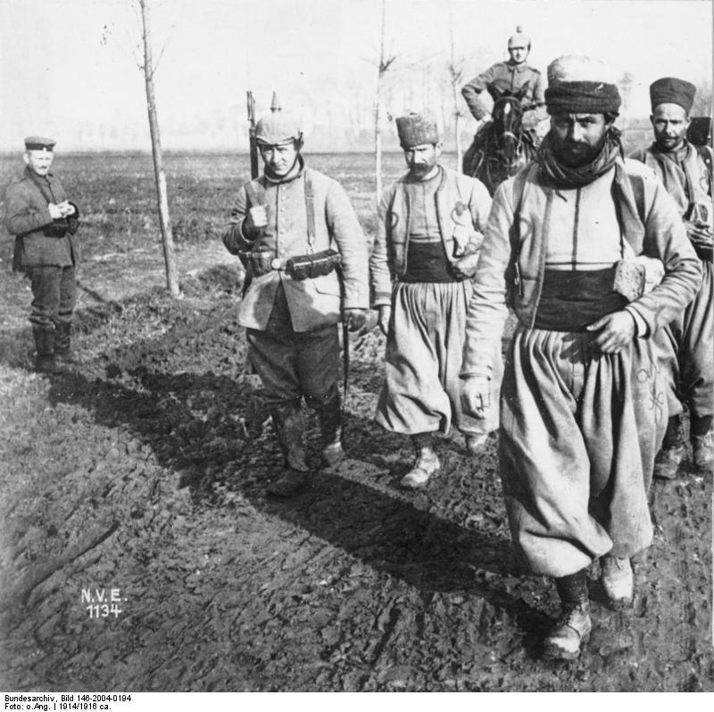 Gefangene Araber aus Algier N.V.E. 1134